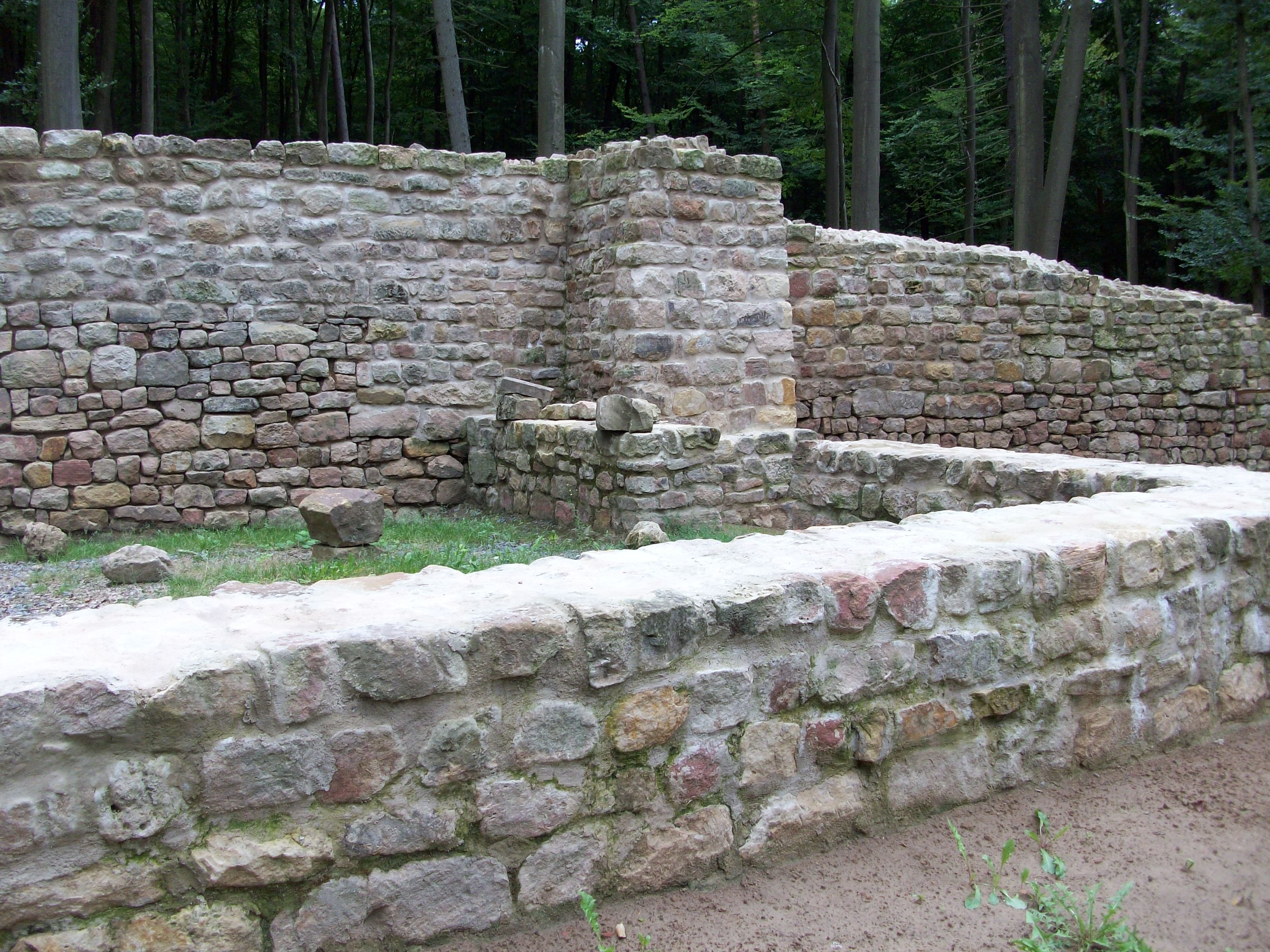 restaurierte Grundmauer von einem der zwei Gebäude im Burgbereich